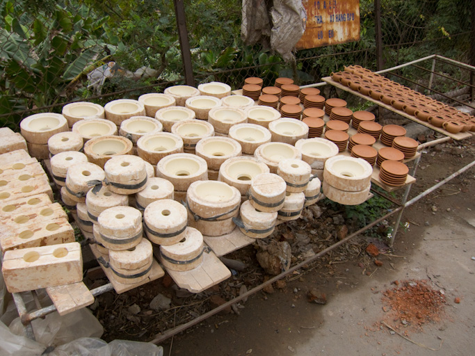 and molded ware drying - khuôn thạch cao để tạo hình đồ gốm